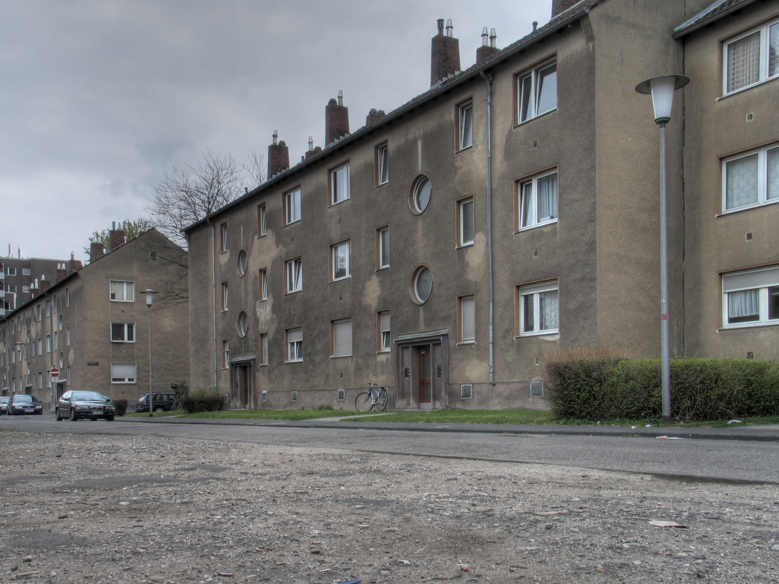 Cologne Kalk Steinmetzstraße